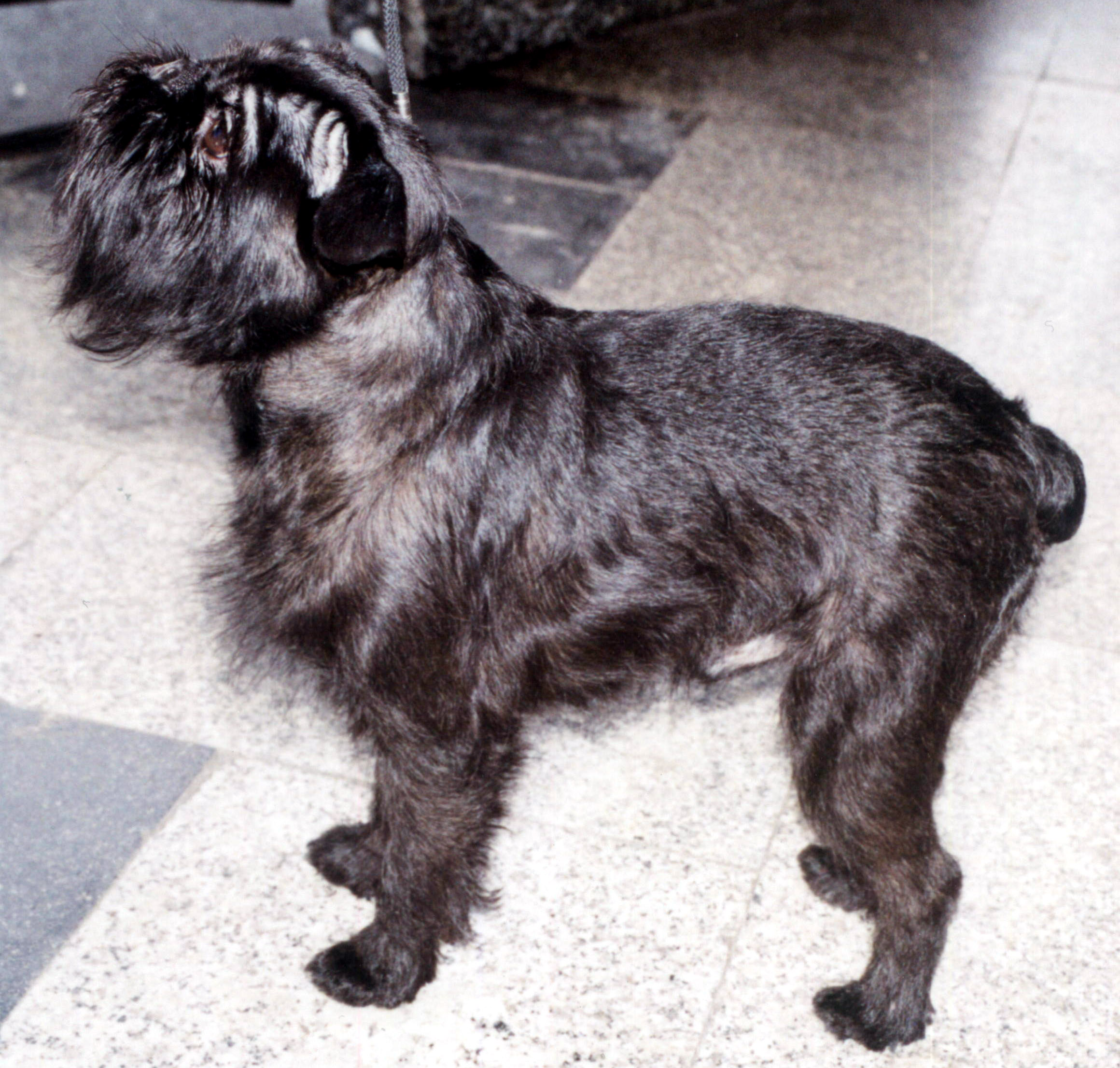 Gryfonik belgijski na miedzynarodowej wystawie psów w Katowicach.